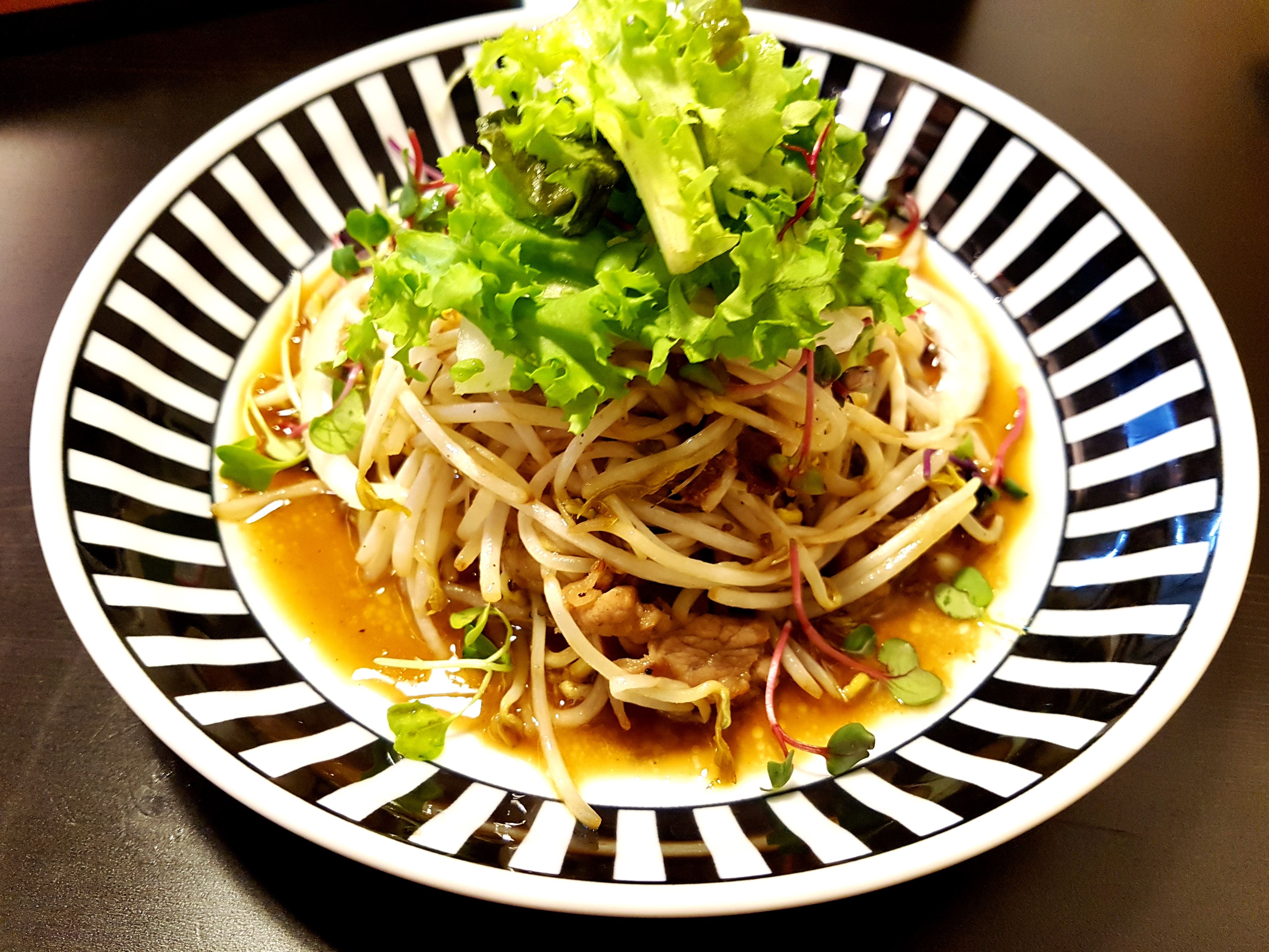 차돌박이 숙주볶음